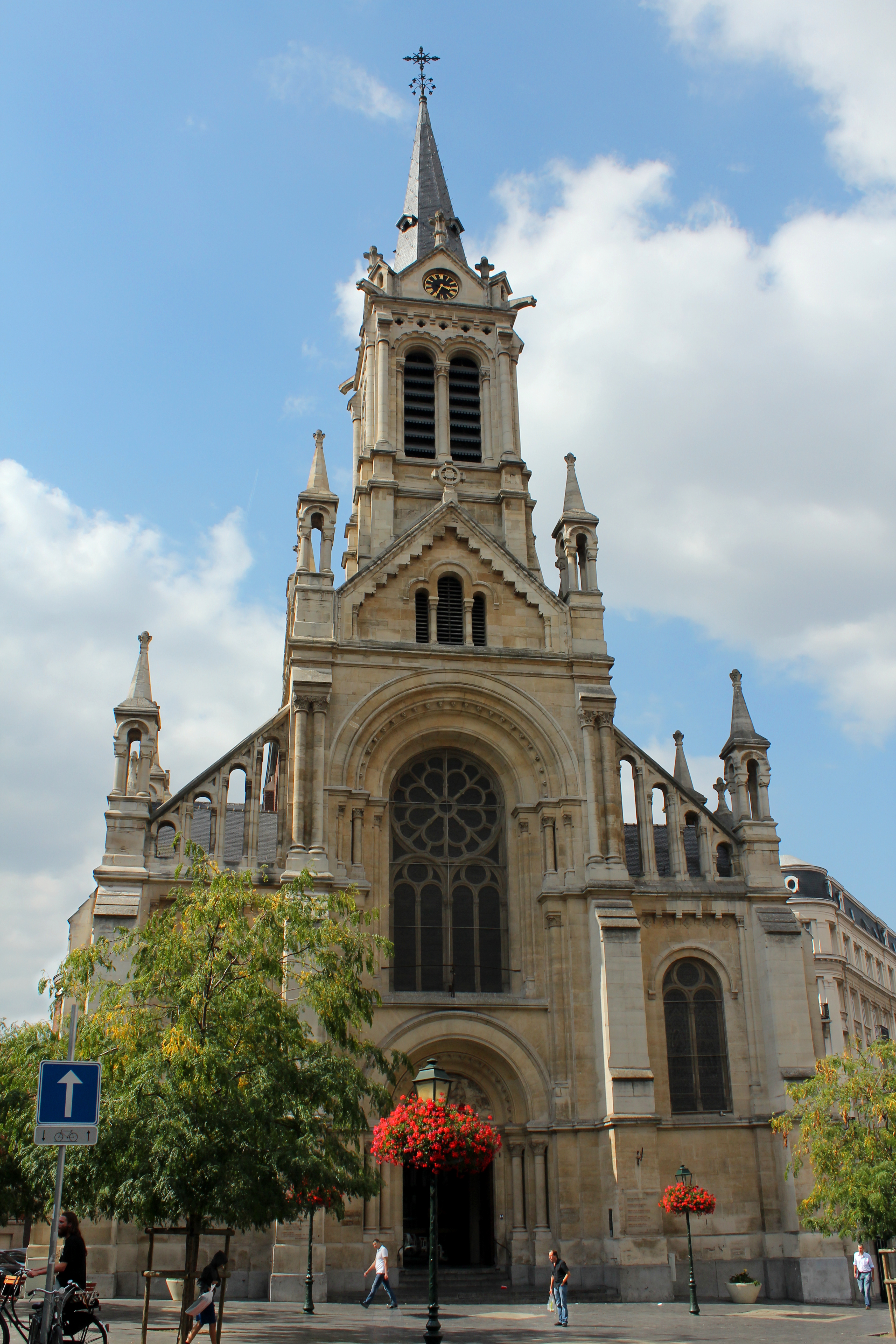 Vue de face de l'église de Saint-Gilles, construite entre 1866 et 1878 par Victor Besme et situé Parvis de Saint Gilles, en Belgique.